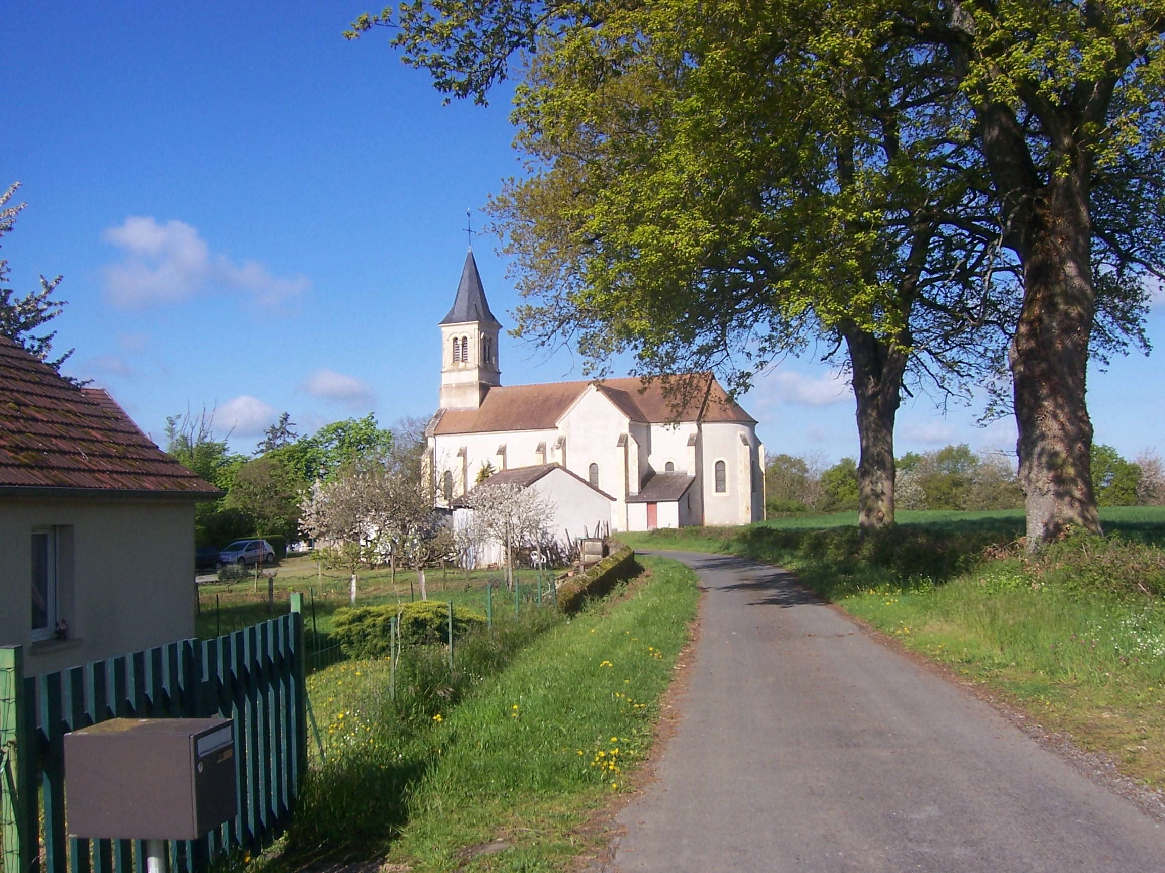 Eglise de Mont